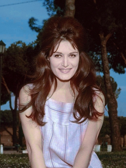 Dalida